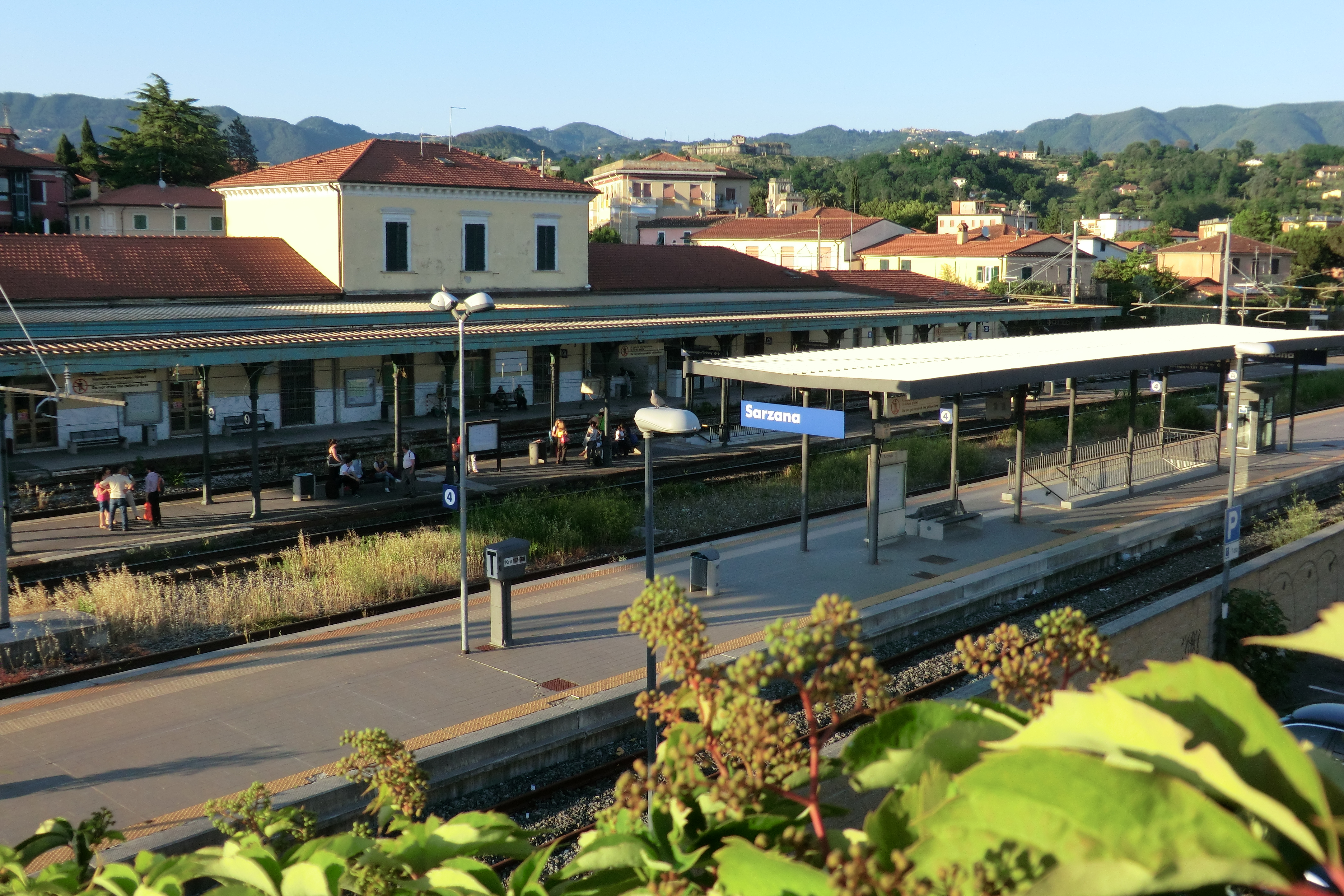 Stazione di Sarzana vista dalla passerella